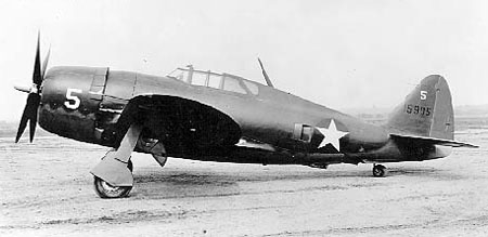 Republic P-47B-RE